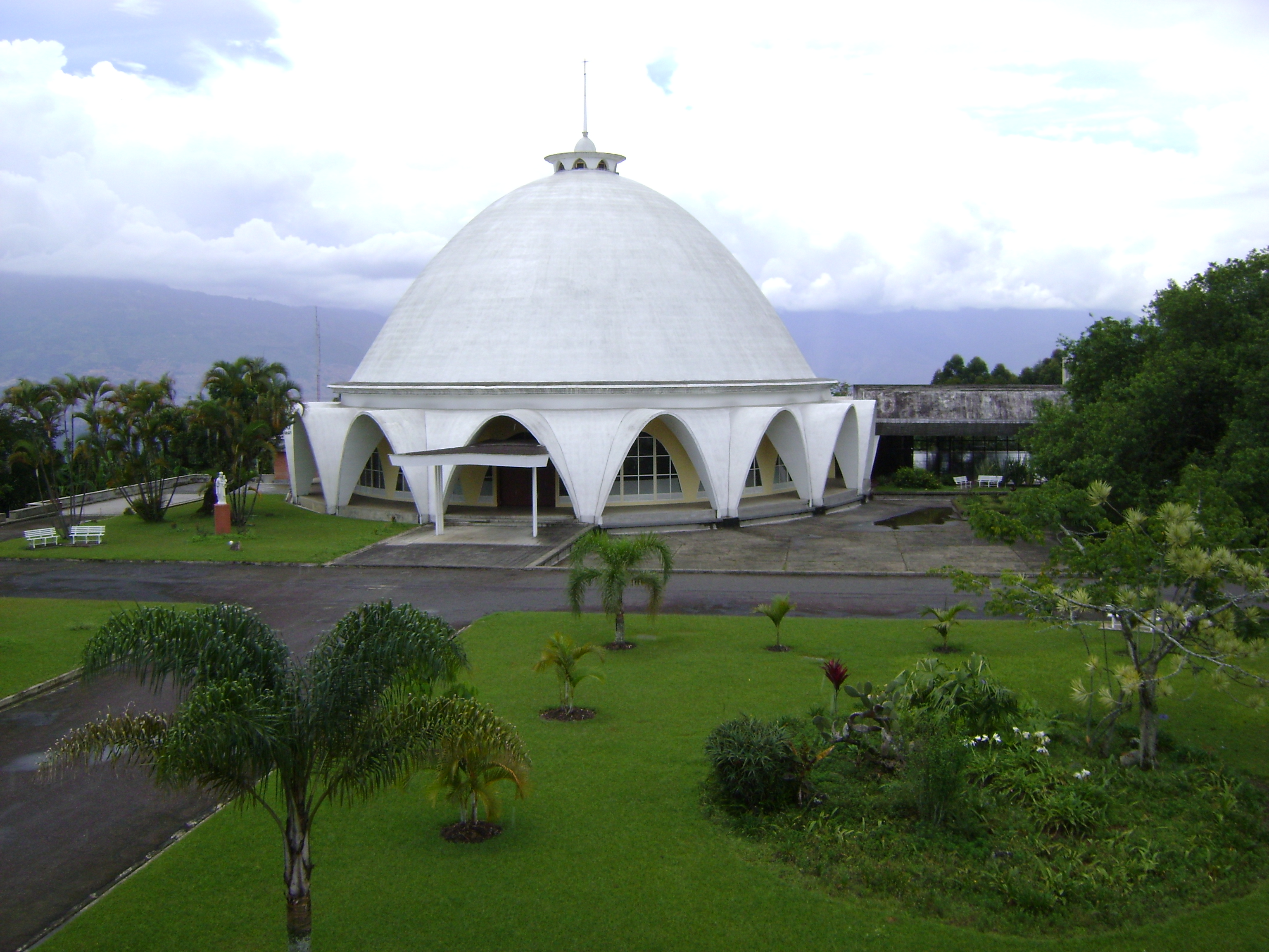 Exterior Capilla Mayor y Jardines